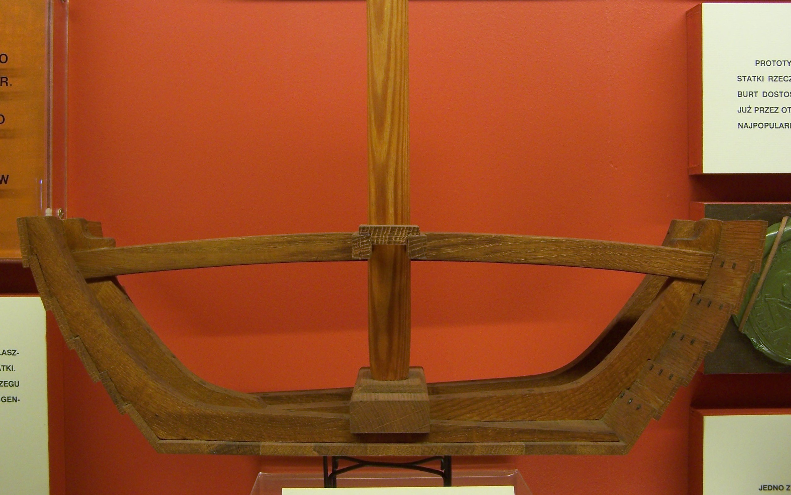 Przekrój poprzeczny kogi z XII w. odkrytej w Brugii (Belgia). Wyk. J.Piątkowski. Skala 1:10. Centralne Muzeum Morskie w Gdańsku.